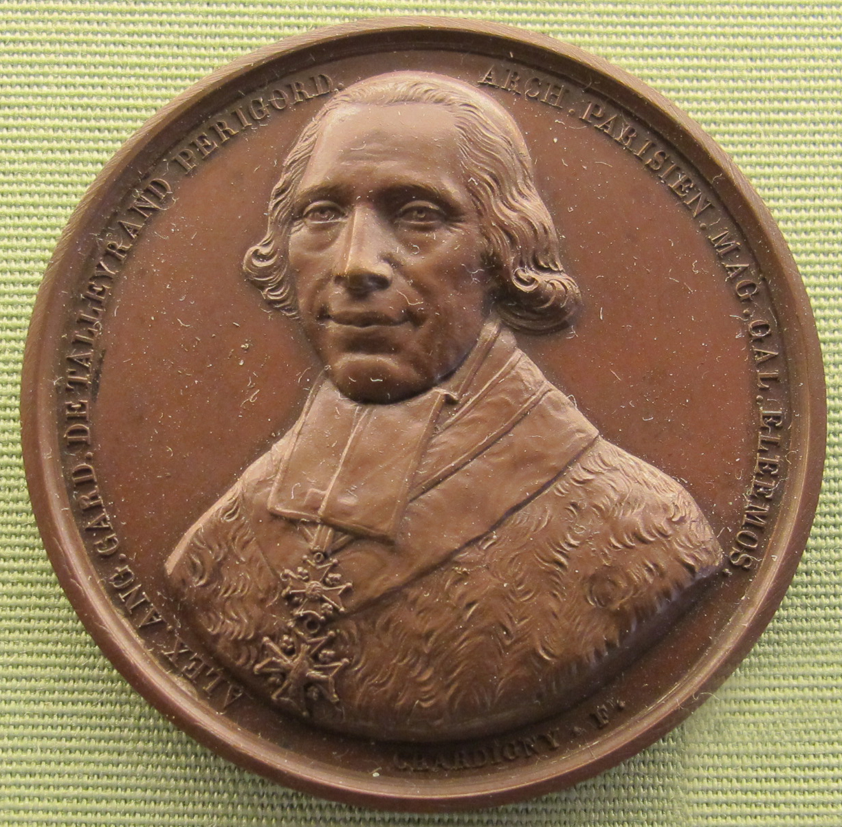 Alexandre Angélique de Talleyrand-Périgord (1736-1821), arcivescovo di parigi, 1821